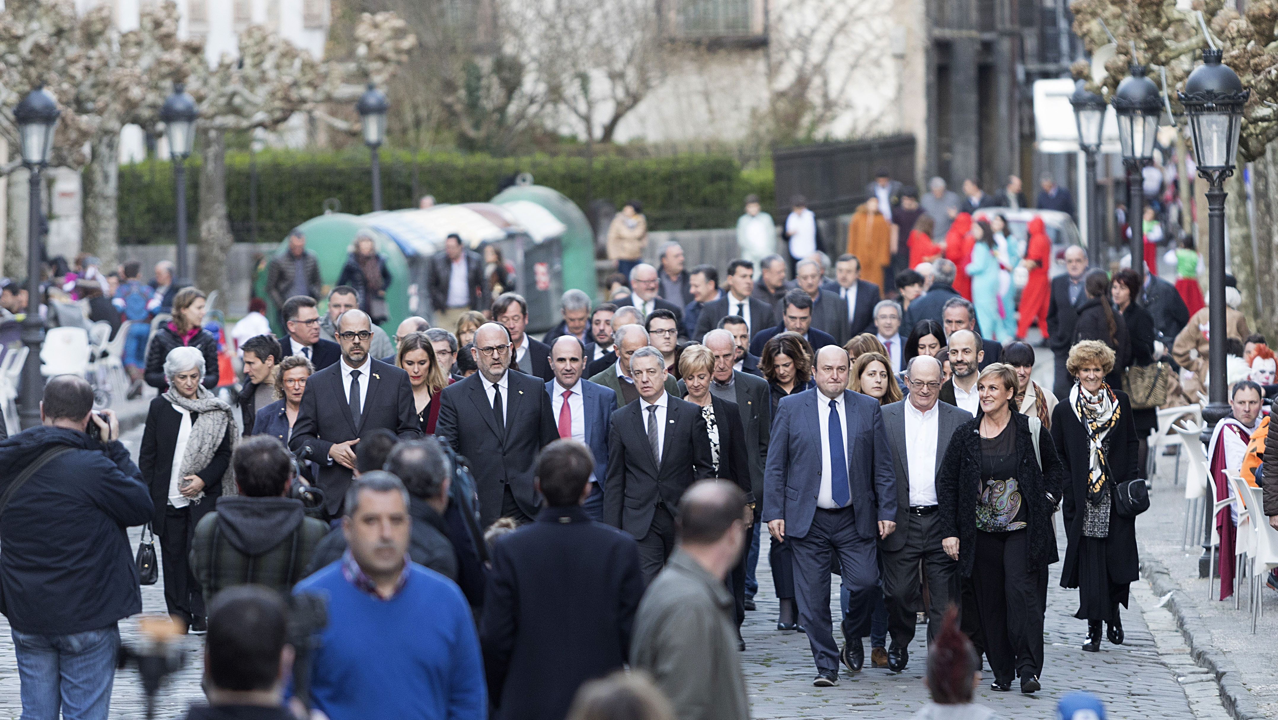 Eusko Jaurlaritza eta Nafarroako Gobernua Xabier Arzalluzen hiletara iristen, beste ordezkari politiko batzuekin batera